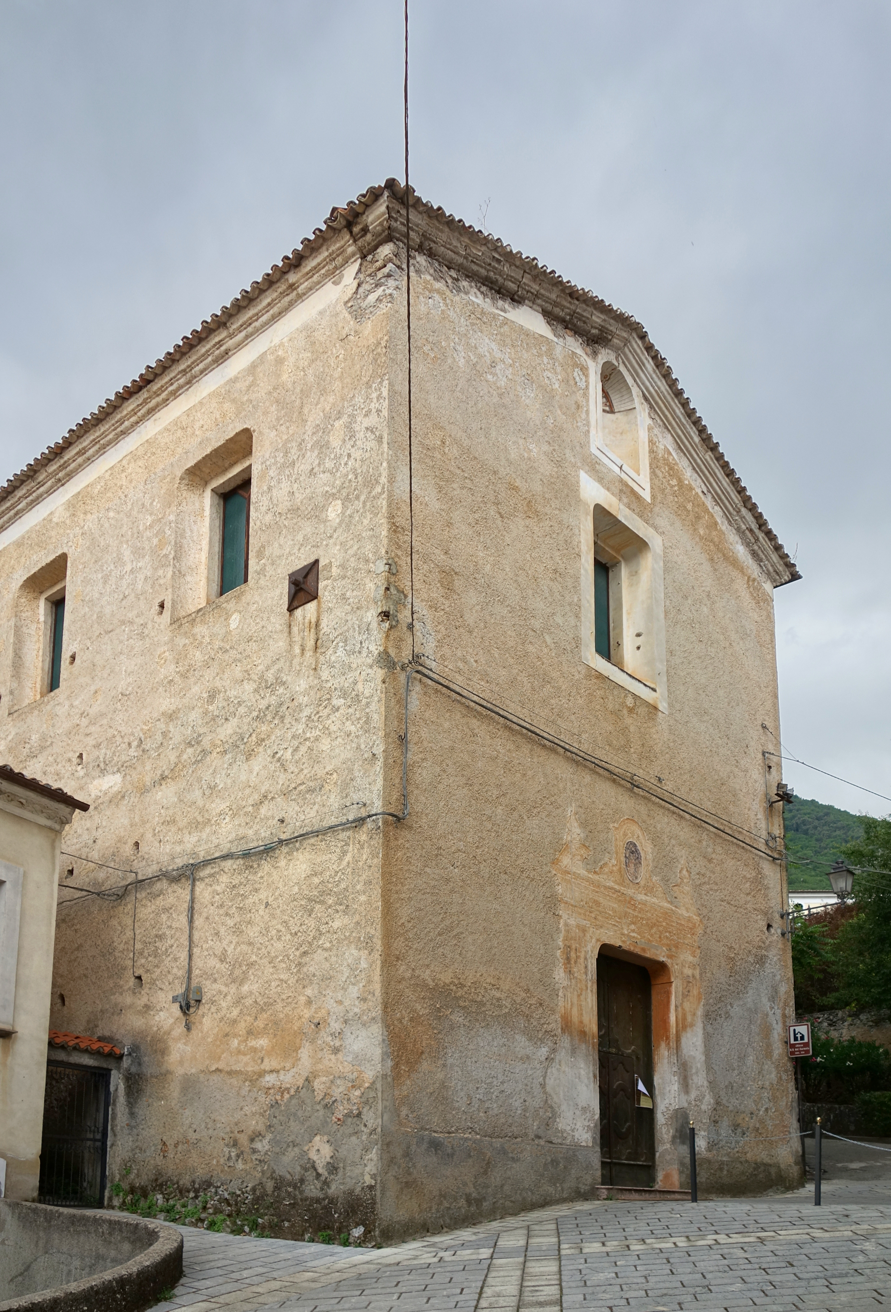 La Chiesa della Beata Vergine del Carmelo de Morano Calabro.